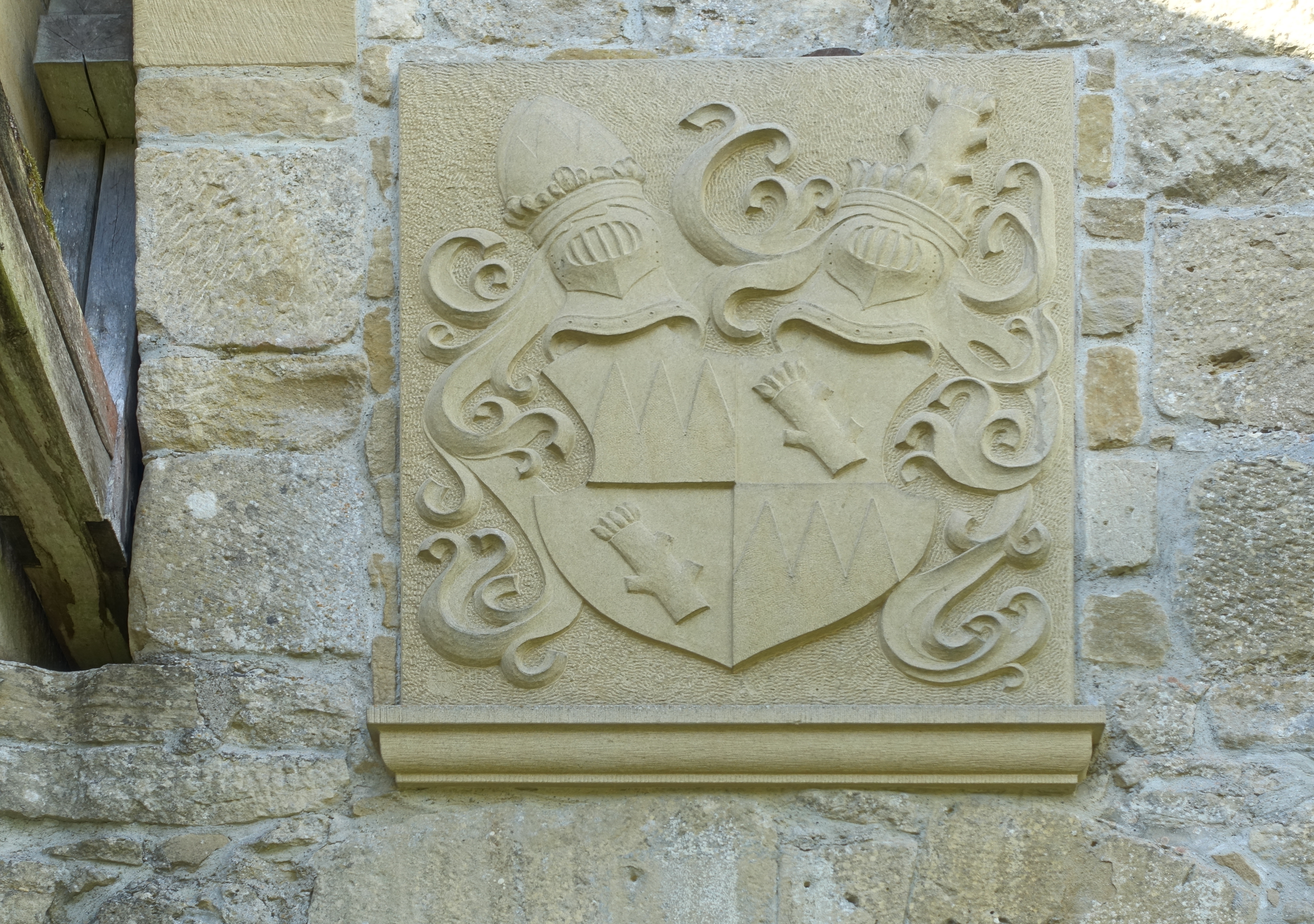 Küssaburg Detail